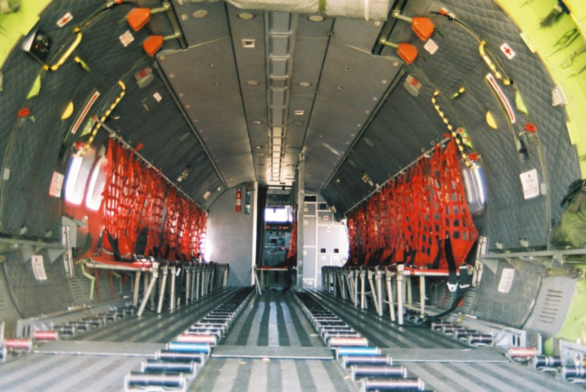 Avion de Transporte CASA CN-235 del Ejercito del Aire Español. Bodega de transporte